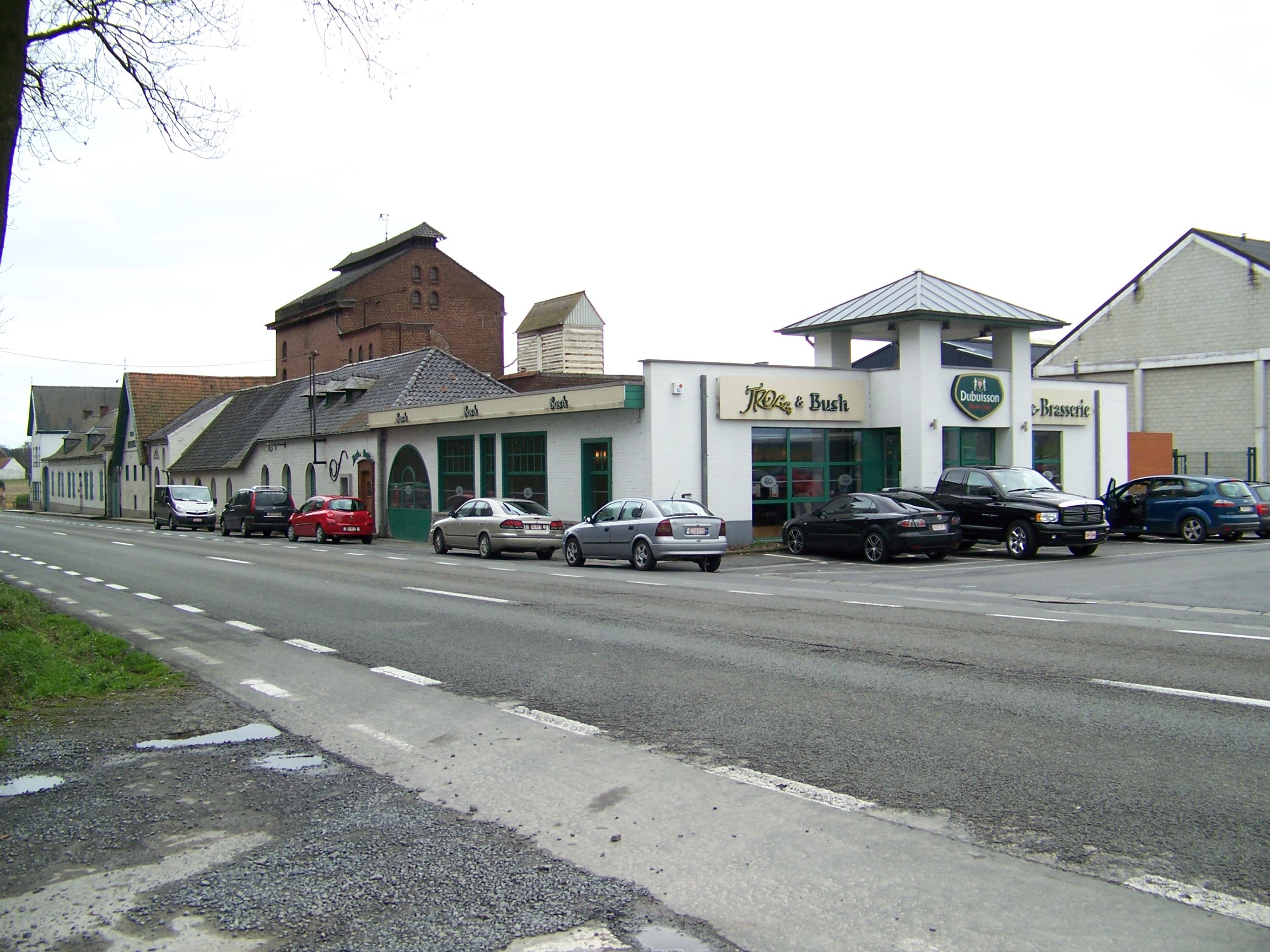 la brasserie Dubuisson, ainsi que son restaurent, le troll & bush